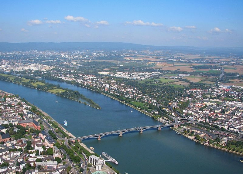 Mainz Luftbild Mainz-Kastel Amöneburg Rhein Petersaue Theodor-Heuss-Brücke Foto 2008 Wolfgang Pehlemann Wiesbaden IMG_0088